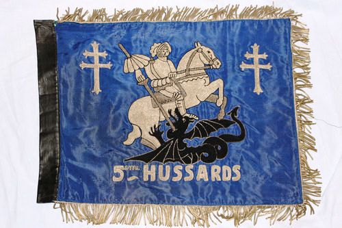 fanion du capitaine Branet [3e compagnie du 501e RCC] reprenant les traditions du 5e Hussards